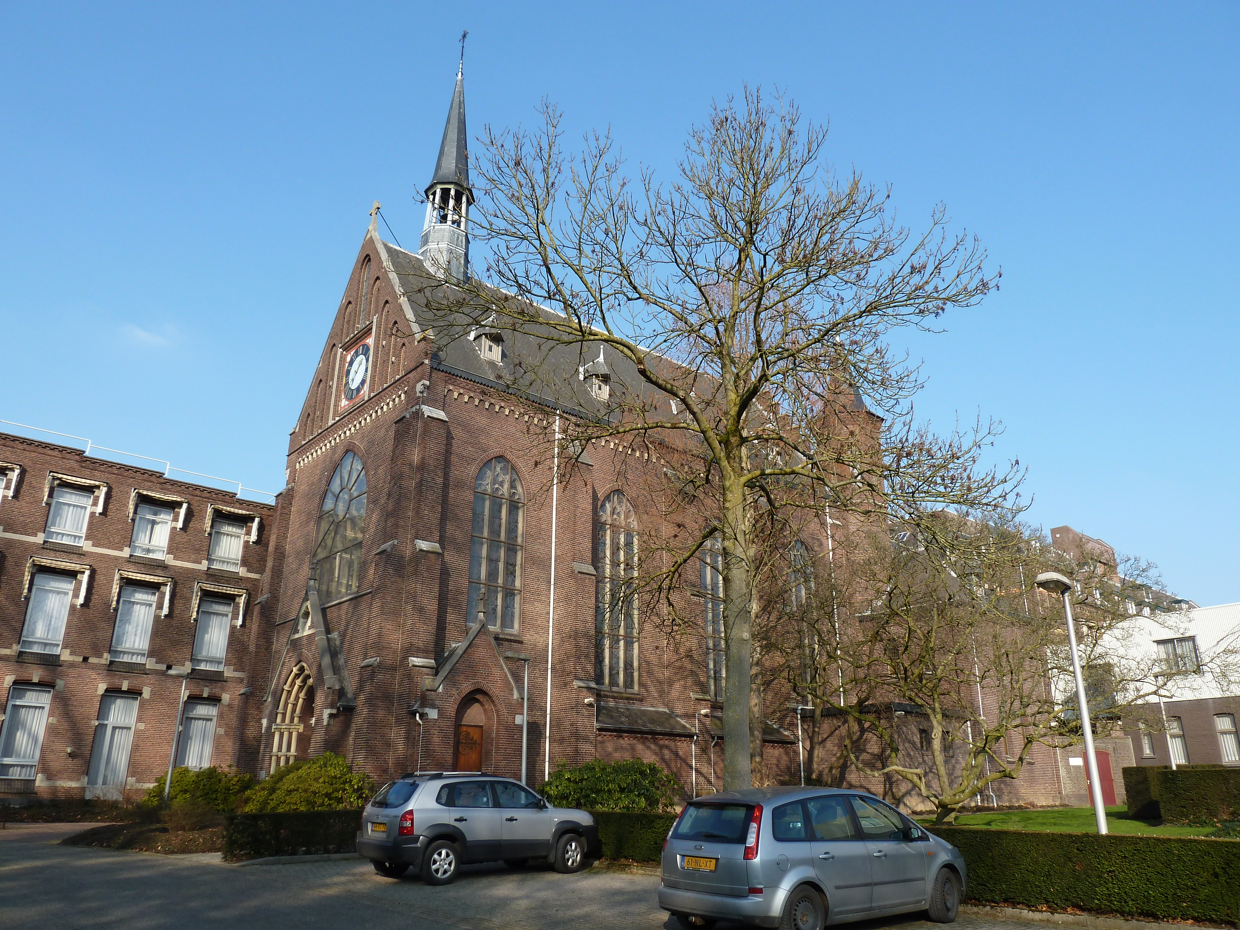 Huize De Berg, Heerlen, Limburg, Nederland